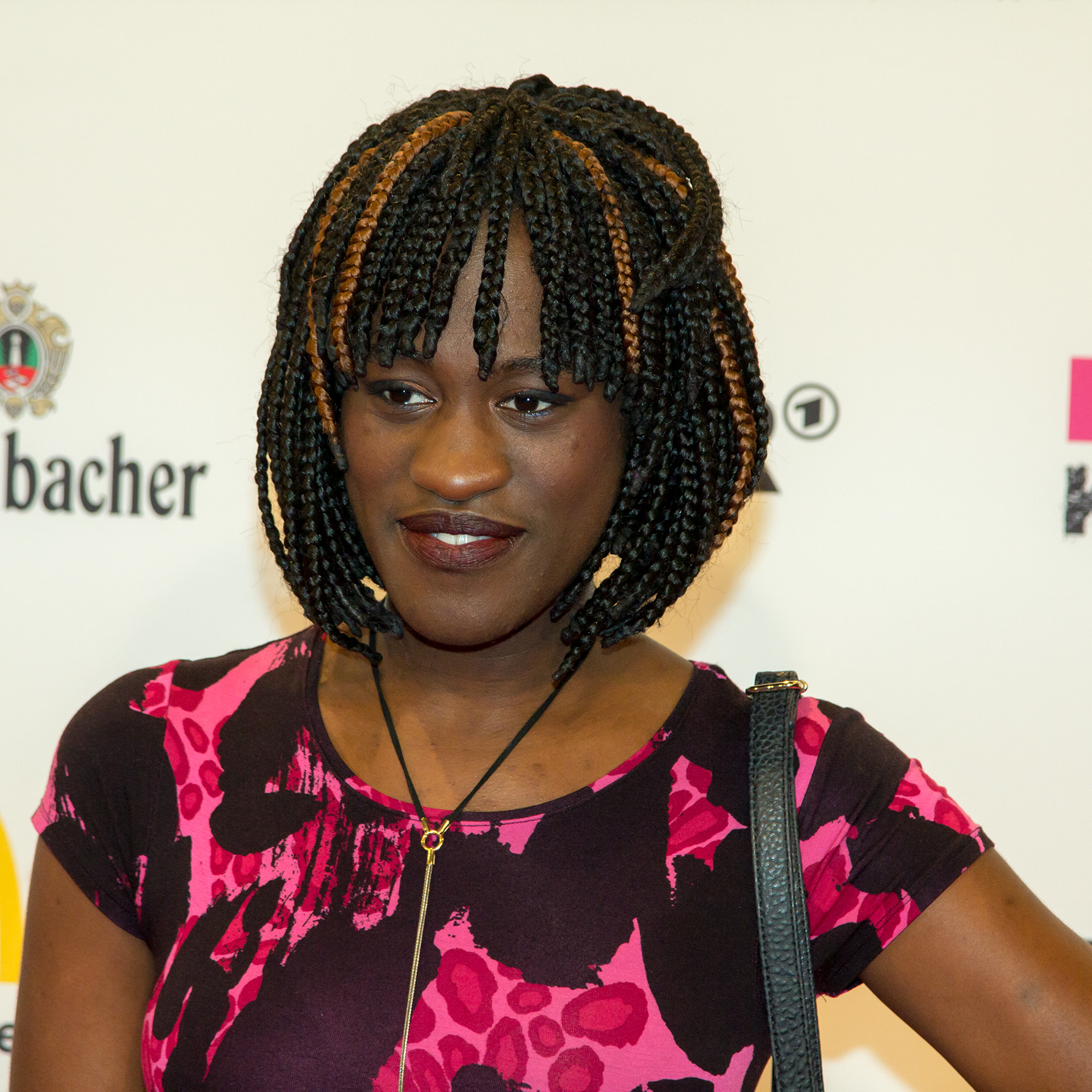 1LIVE Krone 2014 in der Bochumer Jahrhunderthalle: Ivy Quainoo auf dem roten Teppich